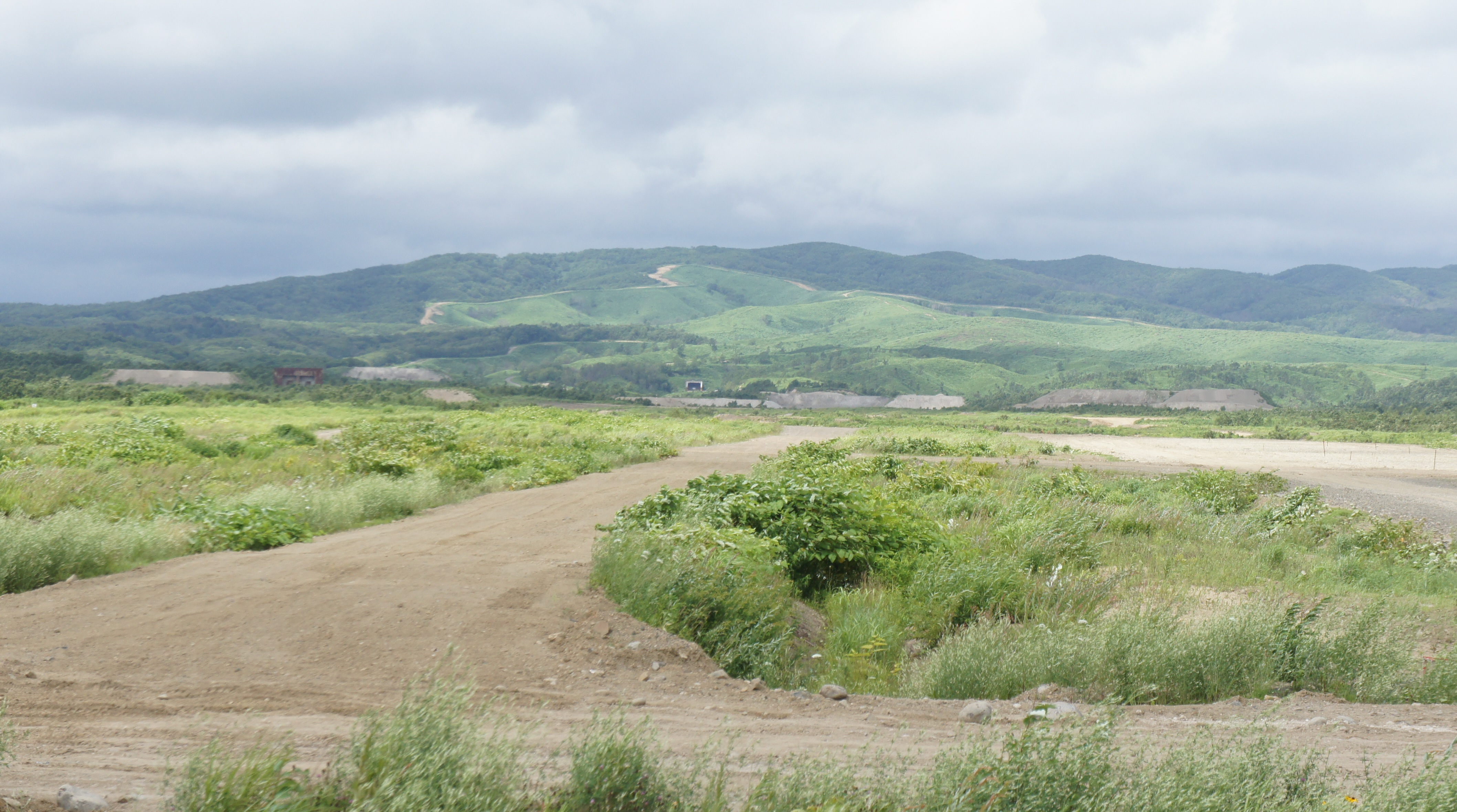 本州に所在する演習場内射撃場の一例 県議会議員による射撃訓練視察時に撮影 撮影時広報担当者による了承を得ています。